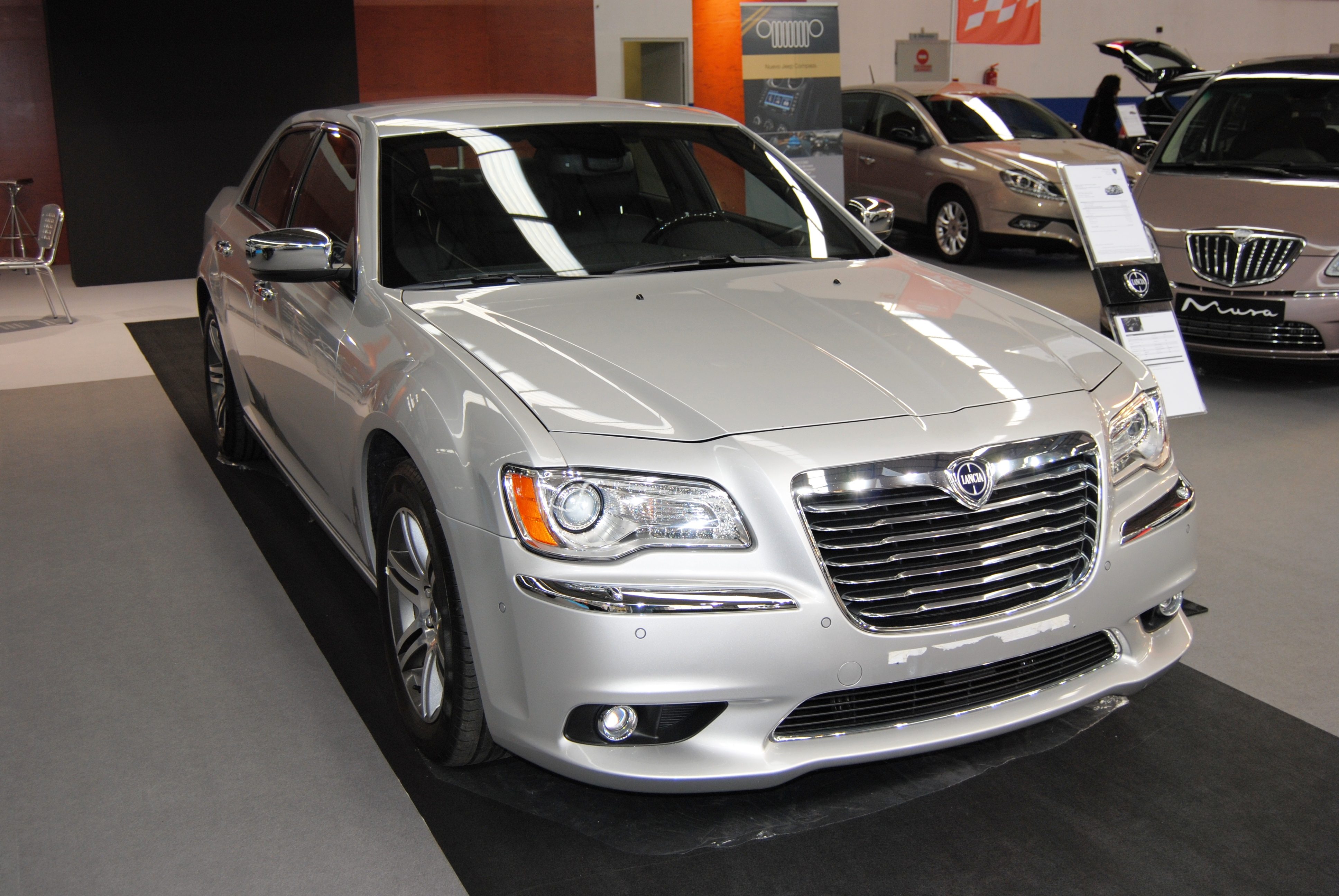 LANCIA THEMA, 2012, IFEVI